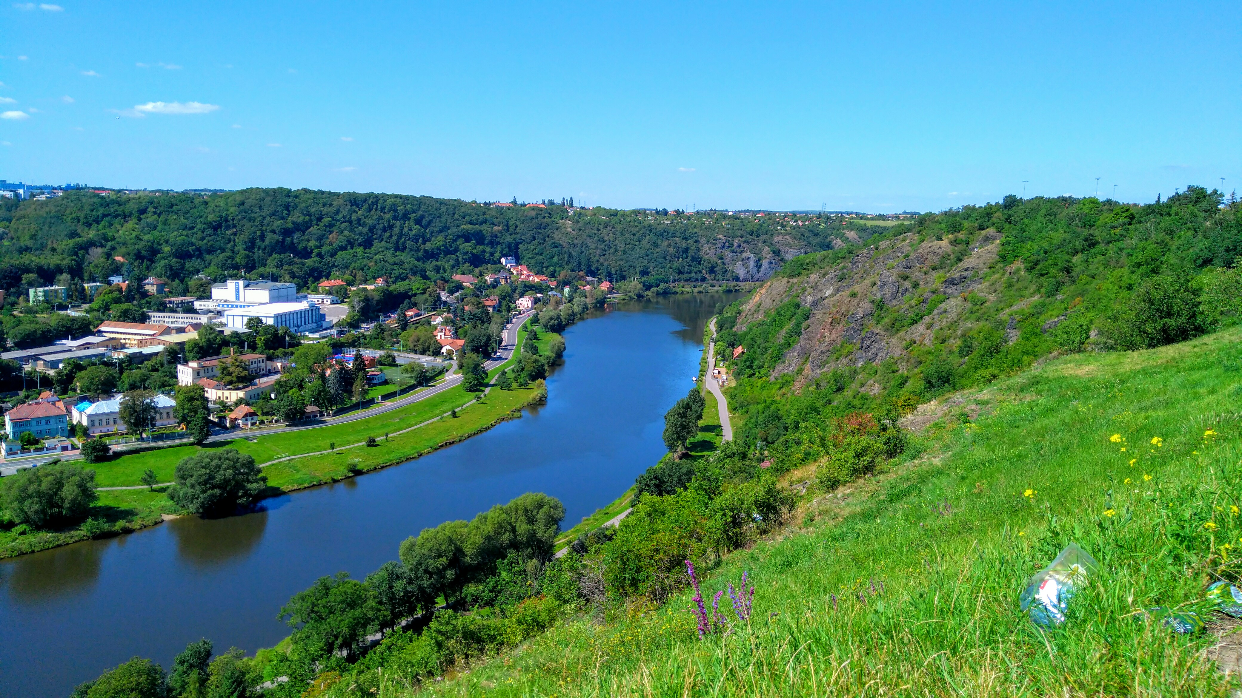 Řeka.